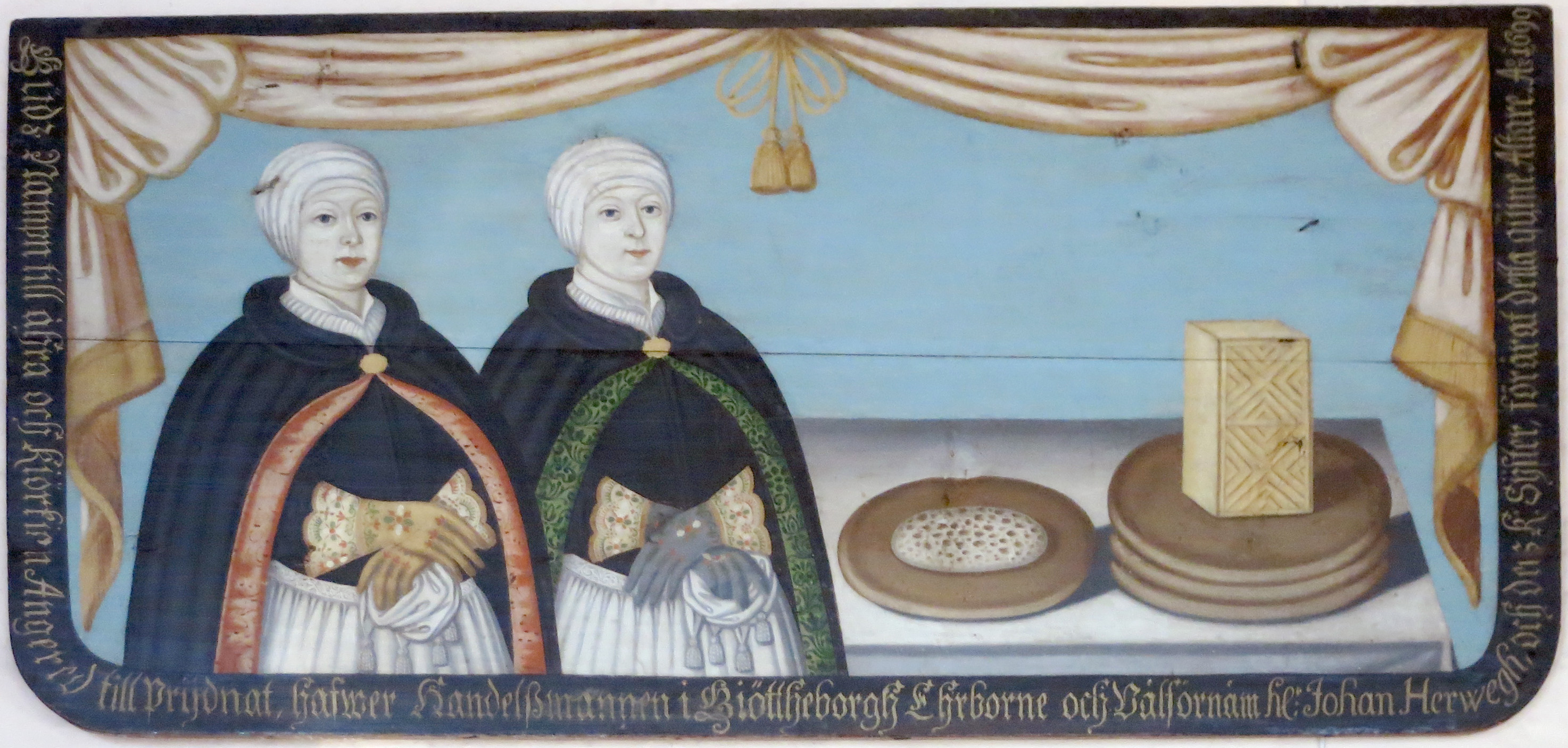 Angereds kyrka. Kvinnoaltaret